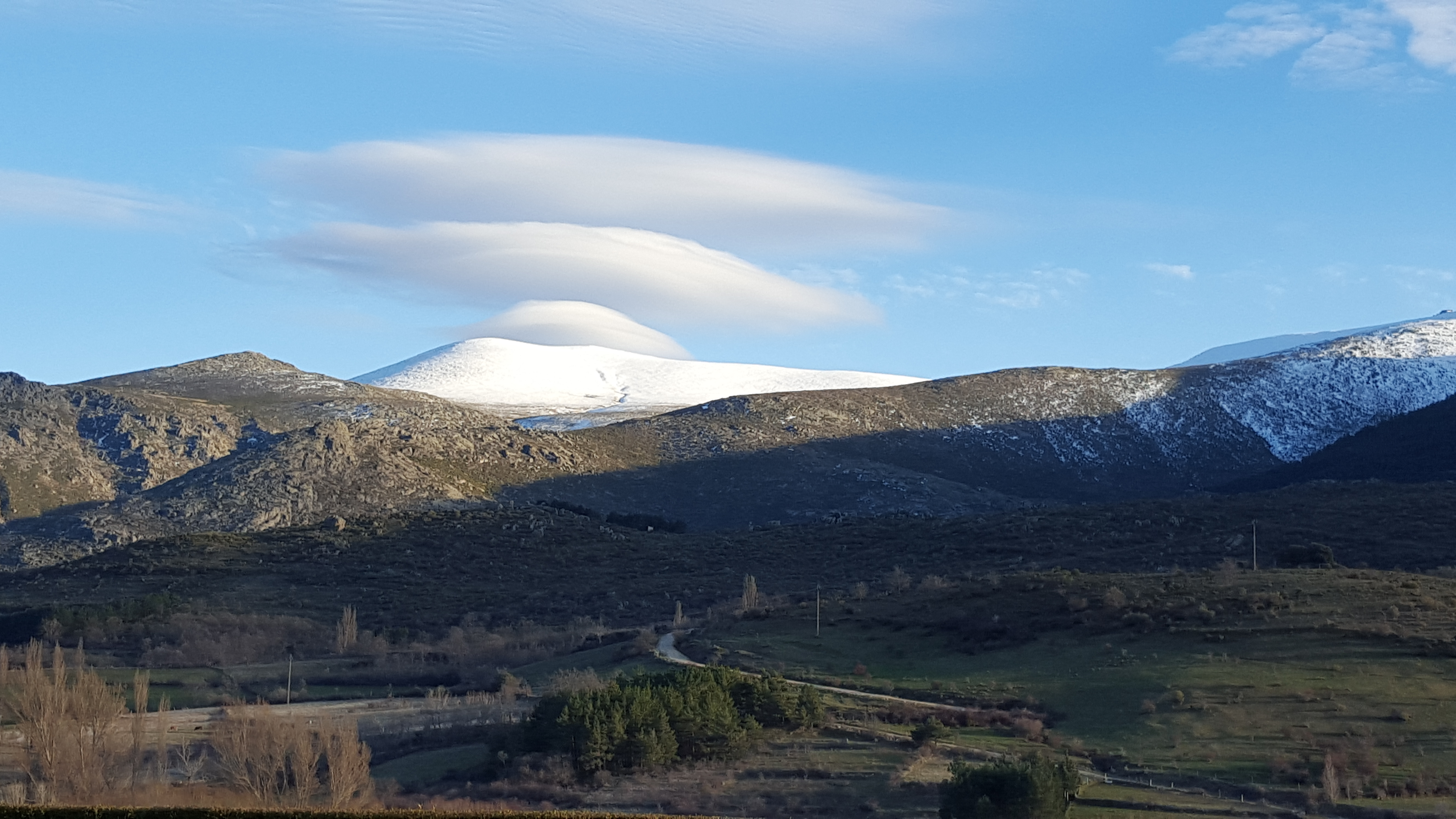 Nube lenticular sobre La Serrota , AV, España This is a photography of a Site of Community Importance in Spain with the ID: ES4110034. Natura2000 entry, EEA entry